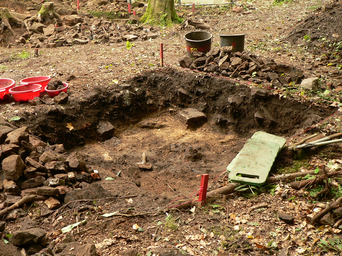 Waldglashütte an der Holzminde, Grabungsqudrant mit Abraum der Glashütte im Boden nahe den Glasöfen